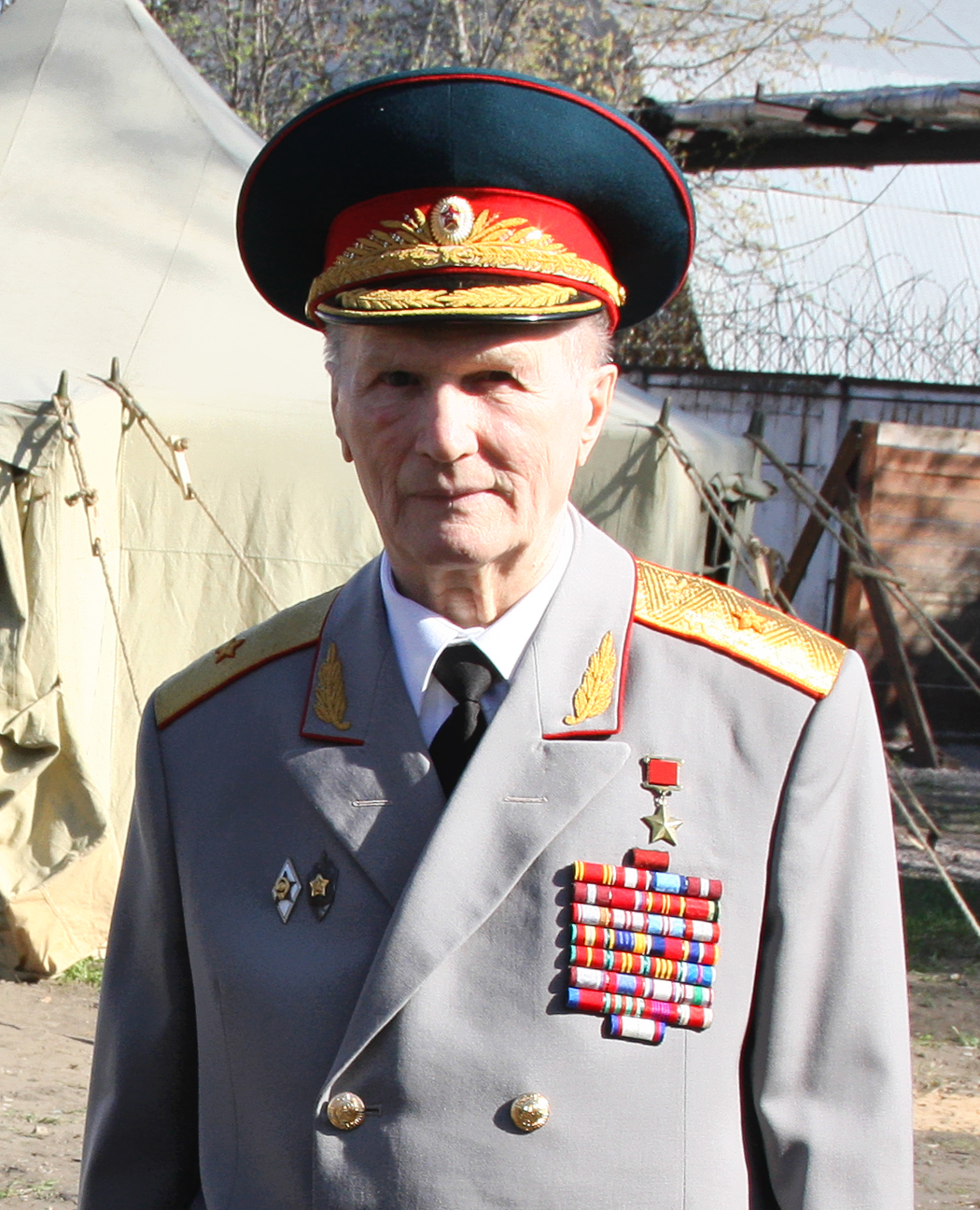 Генерал-майор Зайцев Геннадий Николаевич